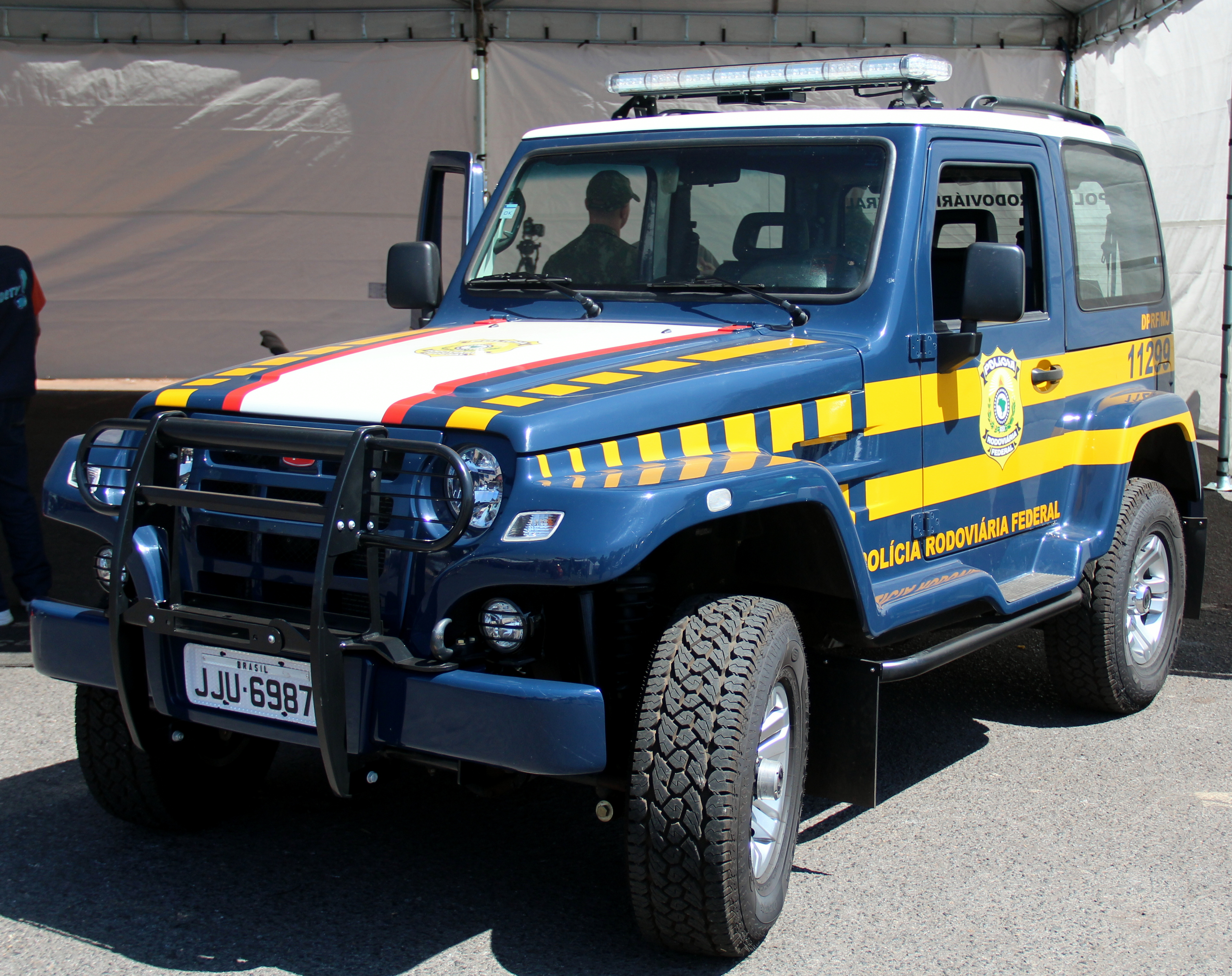 Polícia Rodoviária Federal